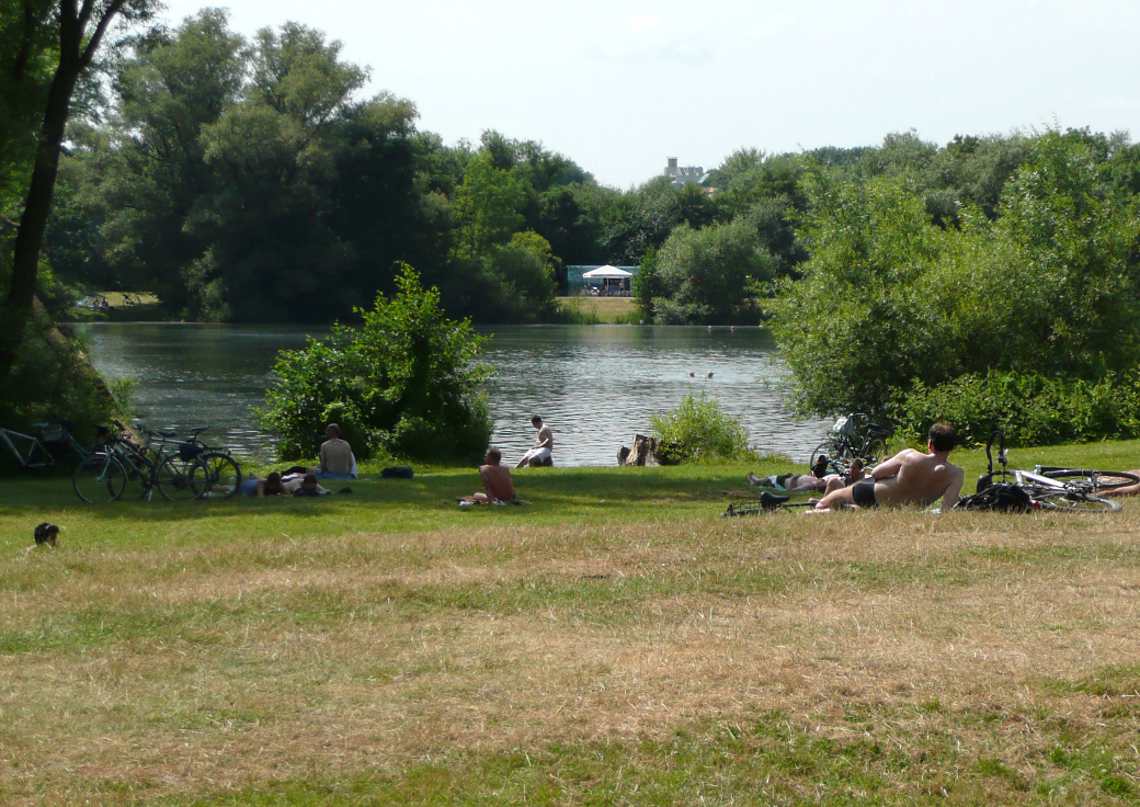 Ricklinger Kiesteiche (Hannover), im Hintergrund der Imbiss-Stand. Liegewiese am Dreiecksteich